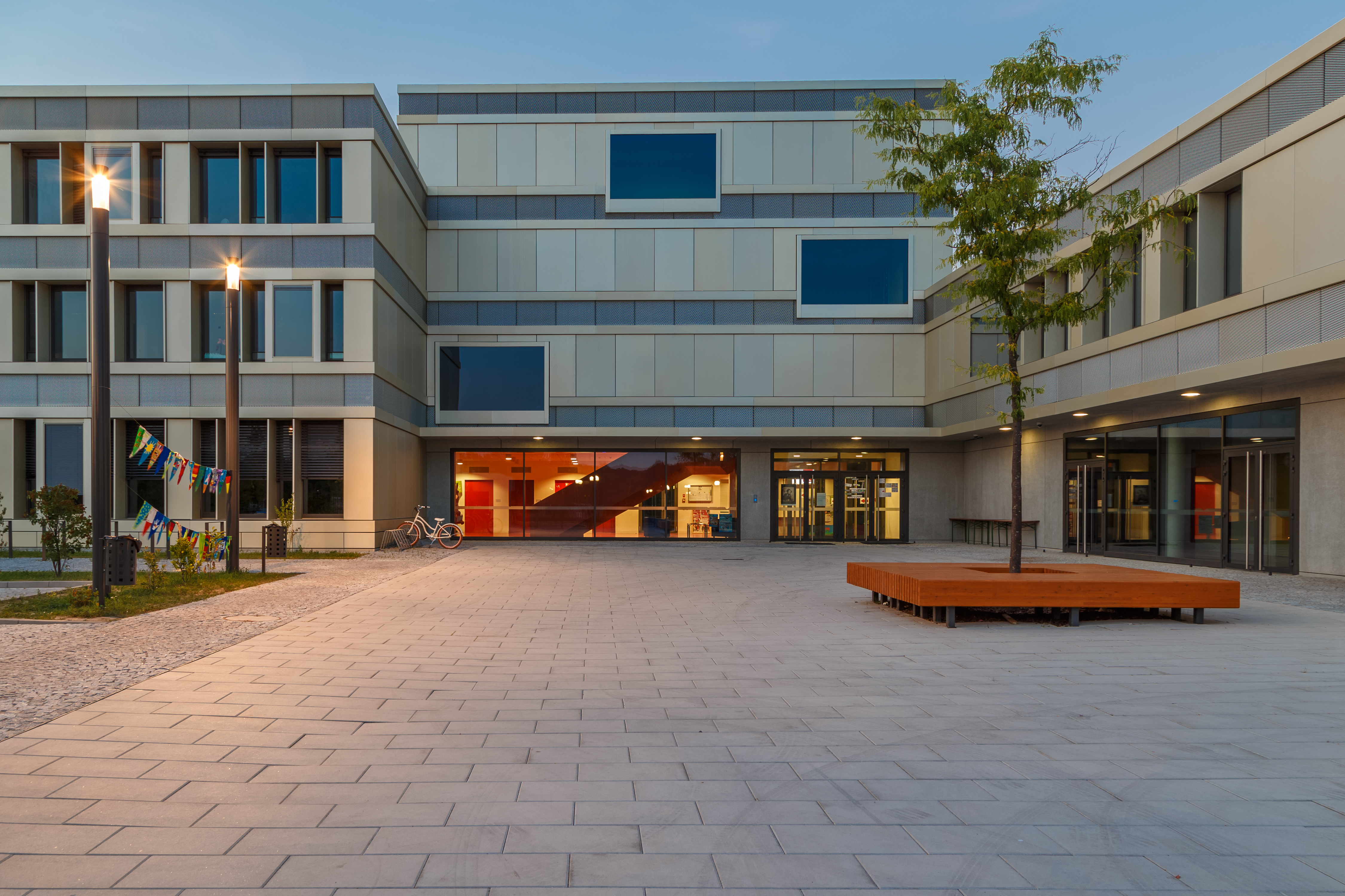 Schulgebäude